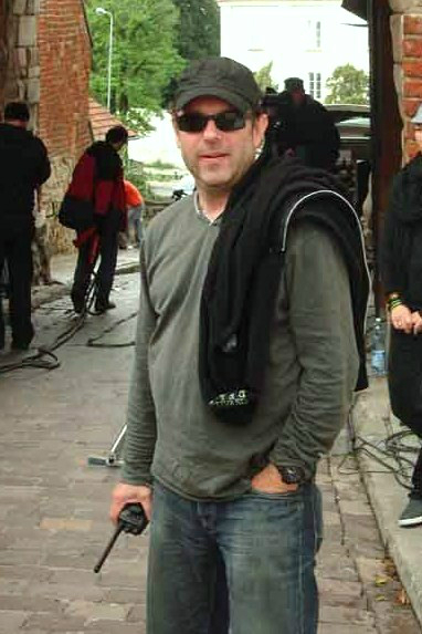 Reżysr Maciej Dejczer na planie serialu "Ojciec Mateusz".